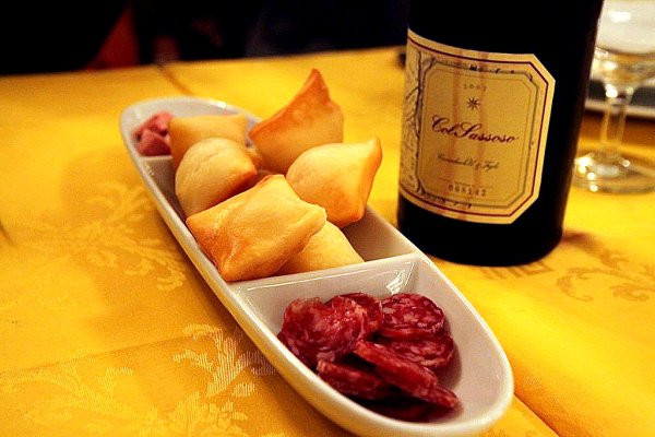 mortadella in the back, gnocco fritto, salame, and lambrusco. trattoria gigina, bologna